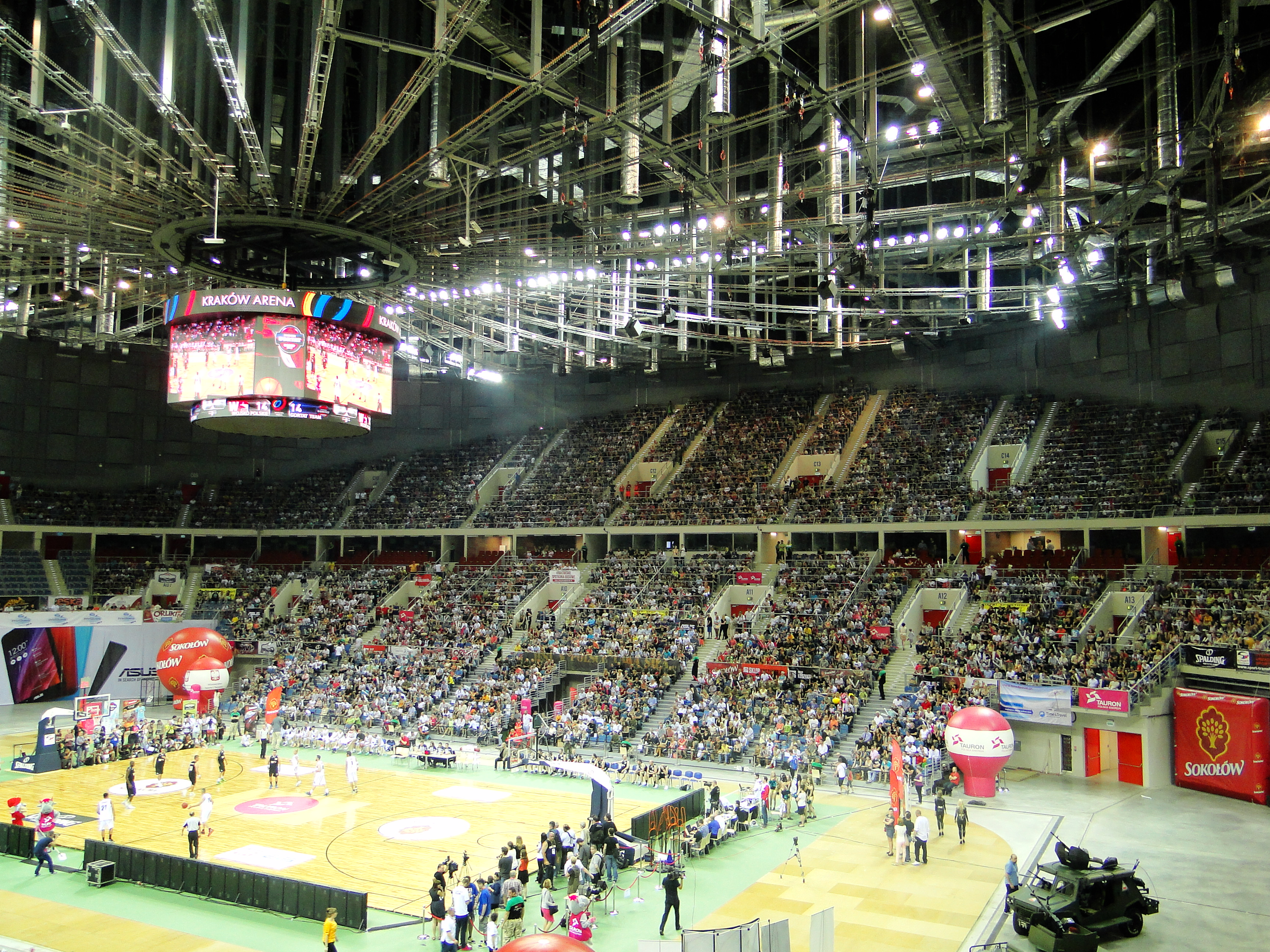 Mecz koszykówki między Gortat Team i Wojskiem Polskim w Kraków Arenie